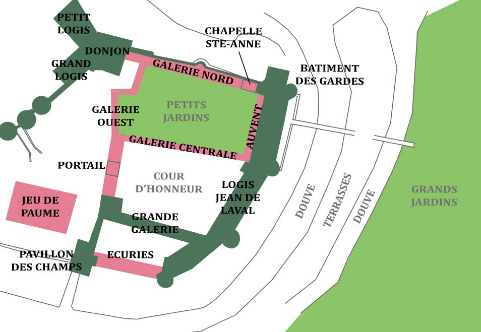 Plan du château de Châteaubriant au milieu du XVIème siècle.